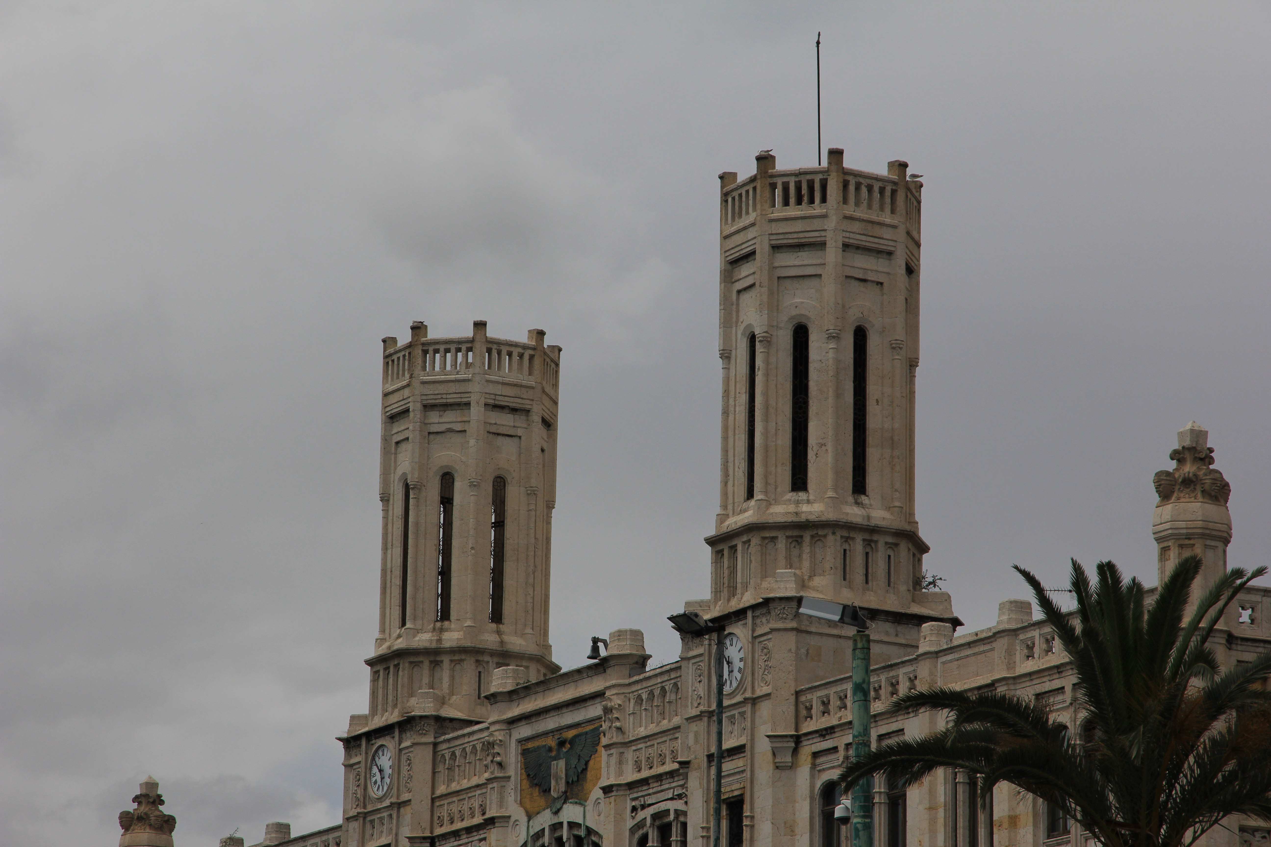 Cagliari - Palazzo civico Ottone Baccaredda